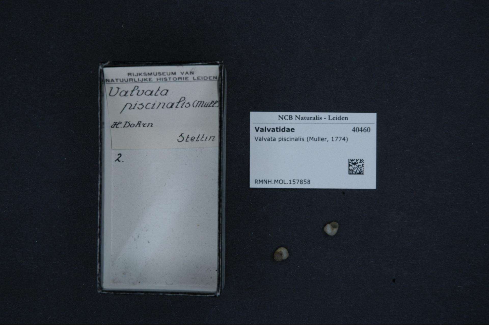 Valvata piscinalis (Muller, 1774)